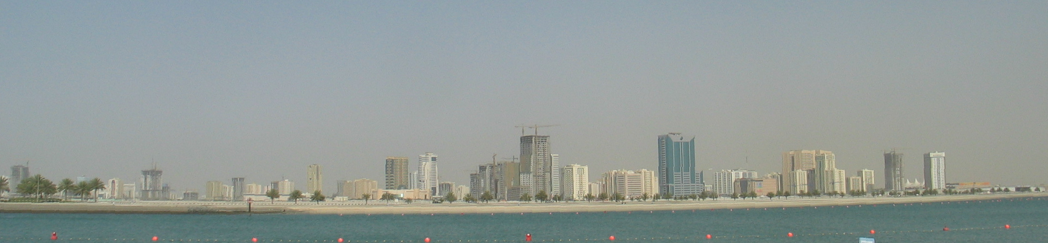 Sharjah Panorama